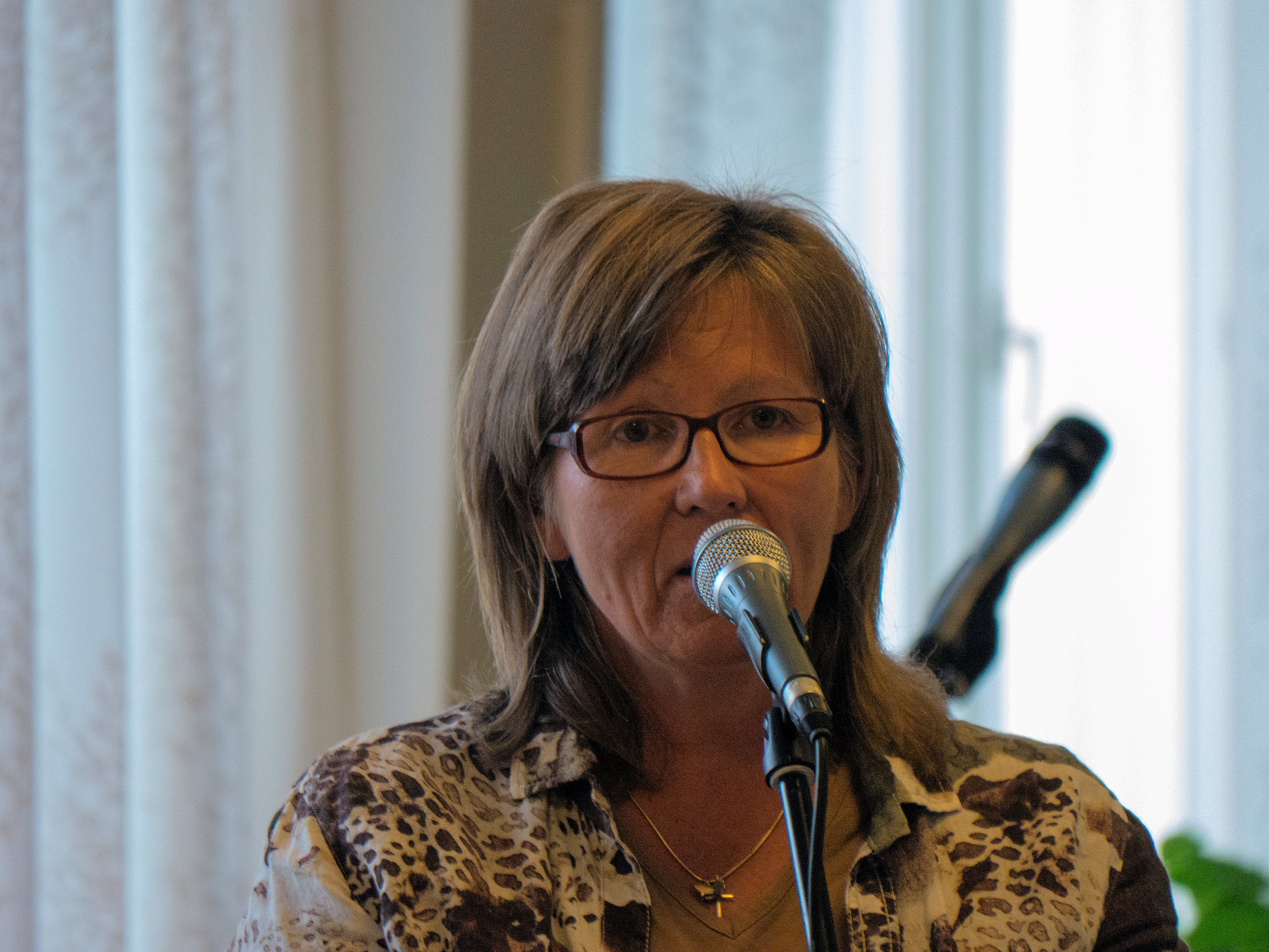 Raili Kiviranta suomalainen kirjailija